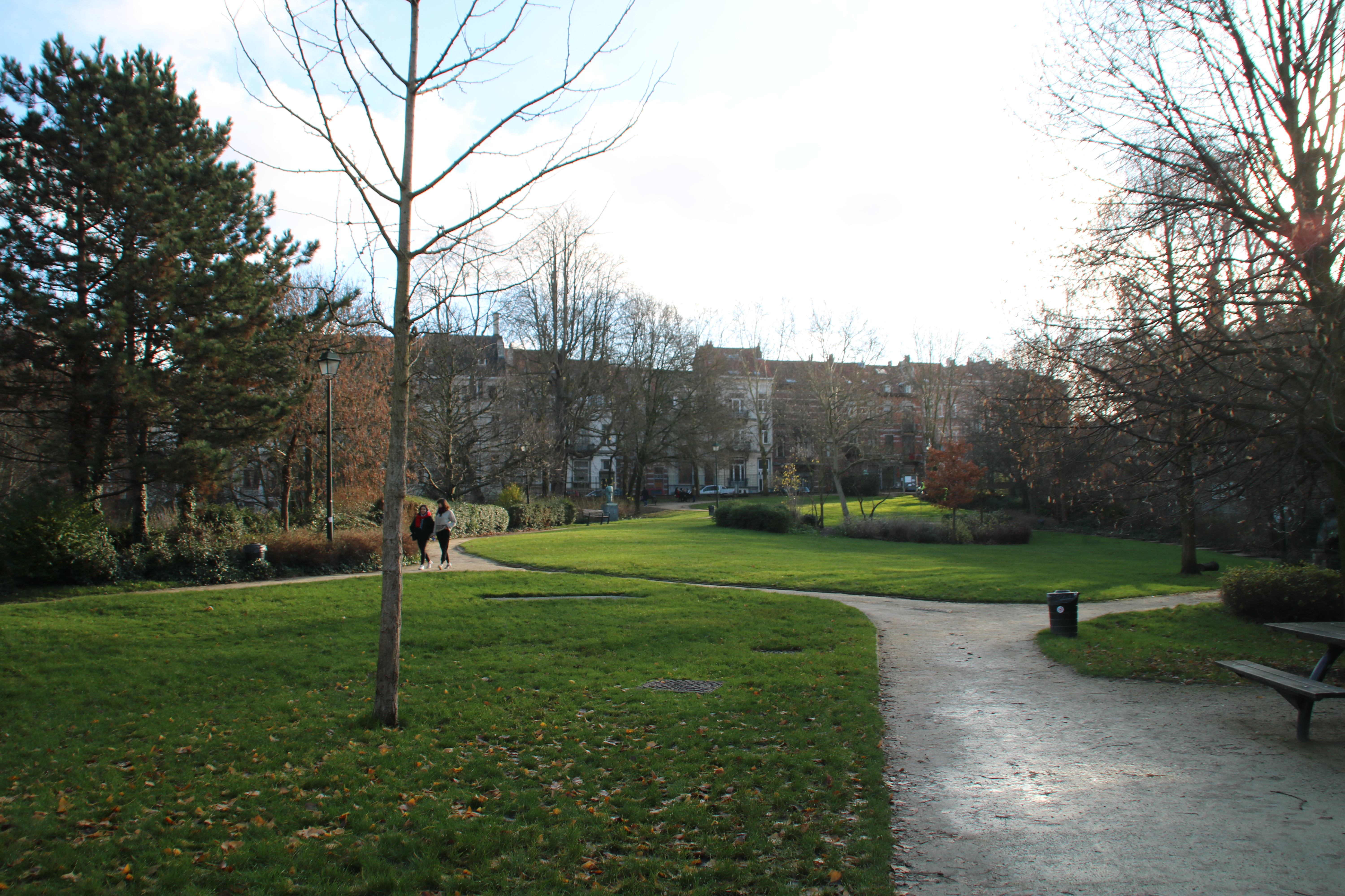 Parc